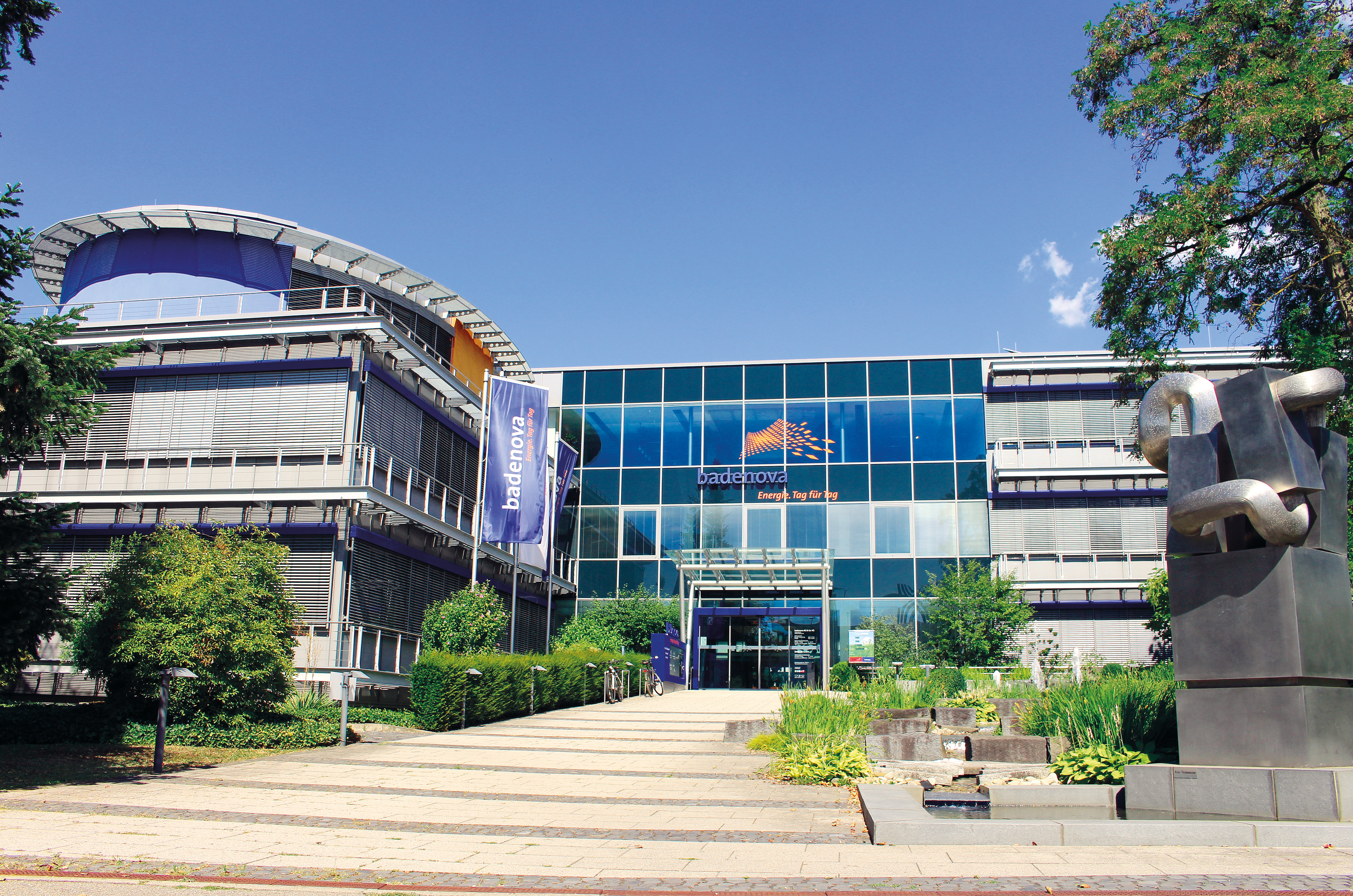 badenova Service-Center Freiburg (Unternehmenszentrale)